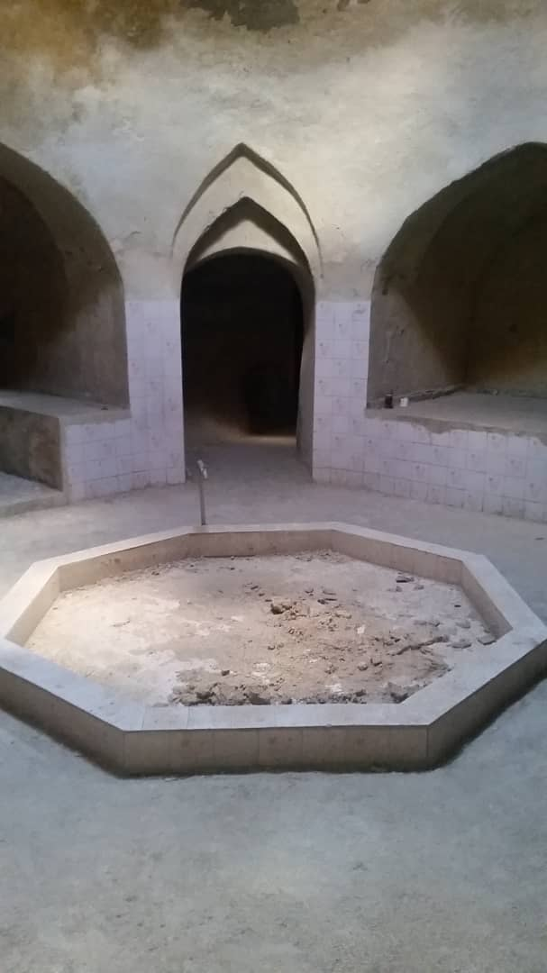 حمام